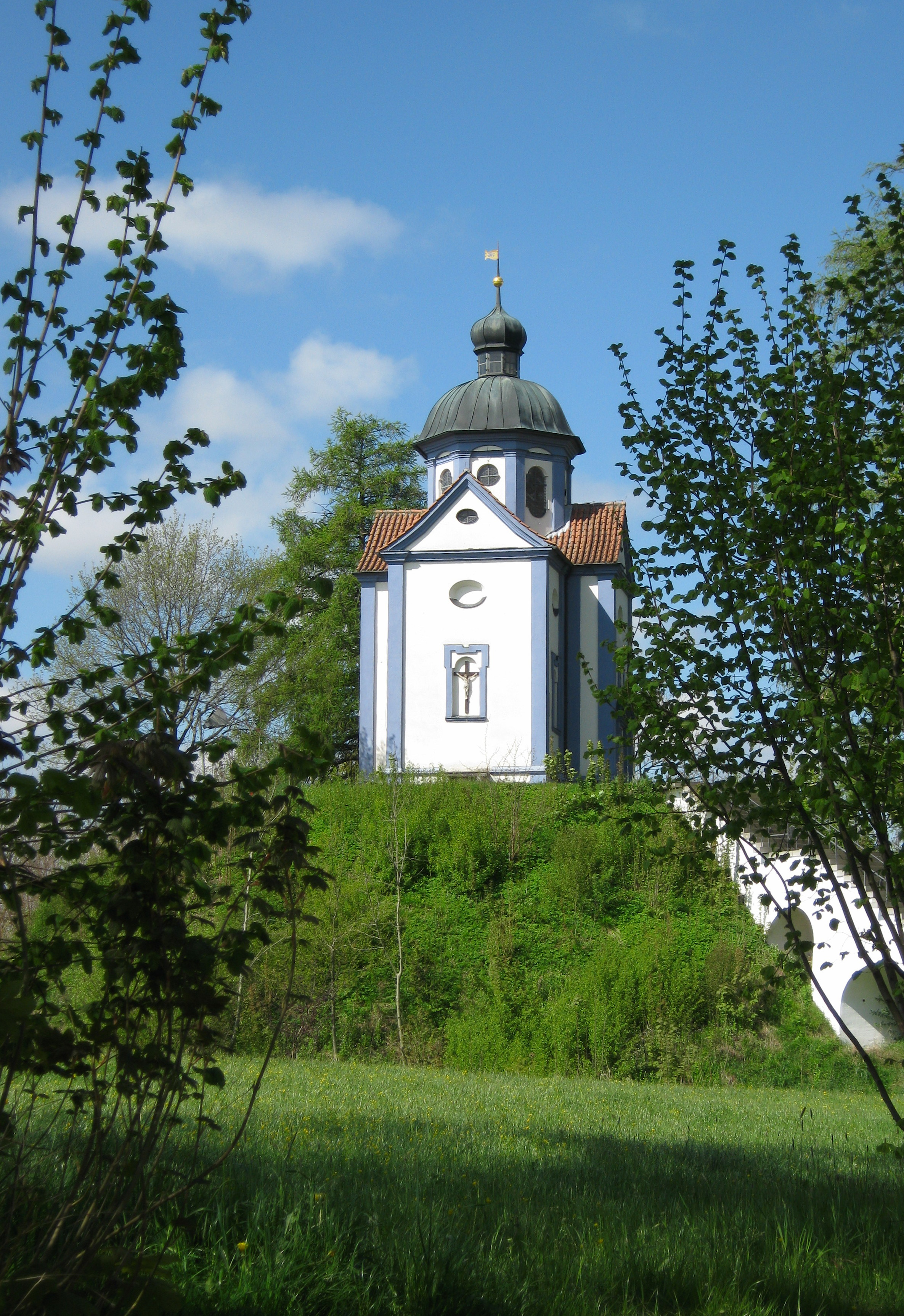 Die Burgstallkapelle Kissing